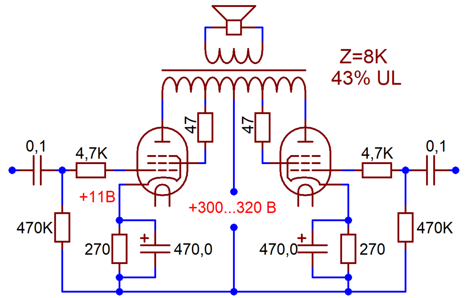 Типовая схема ультралинейного включения EL84 (Mullard 5-10, GEC 912+) с номиналами, уточненными по Morgan Jones. Valve amplifiers. Third edition